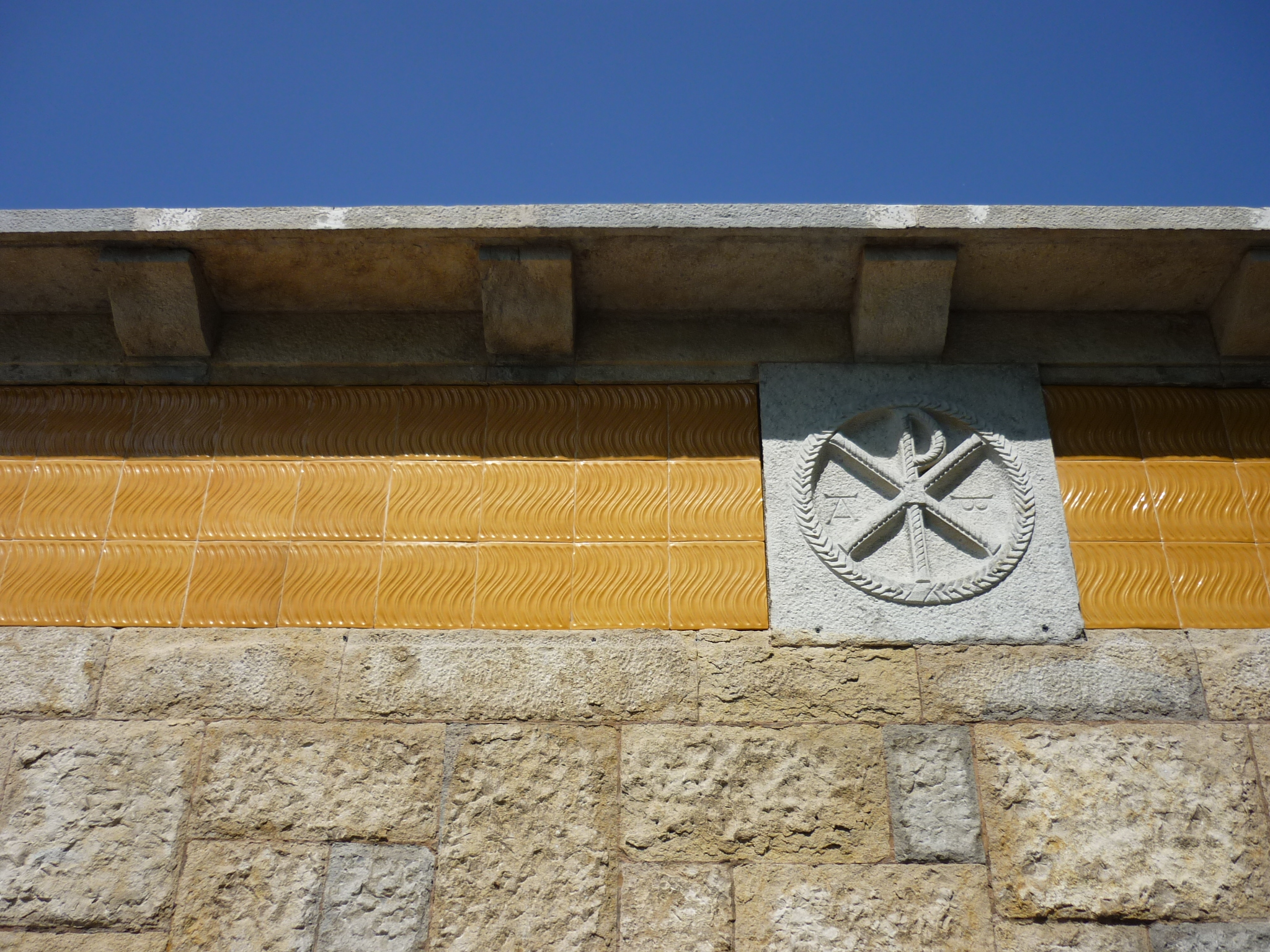 Façana Cementiri